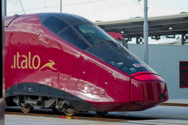 Een AGV .italo van NTV.